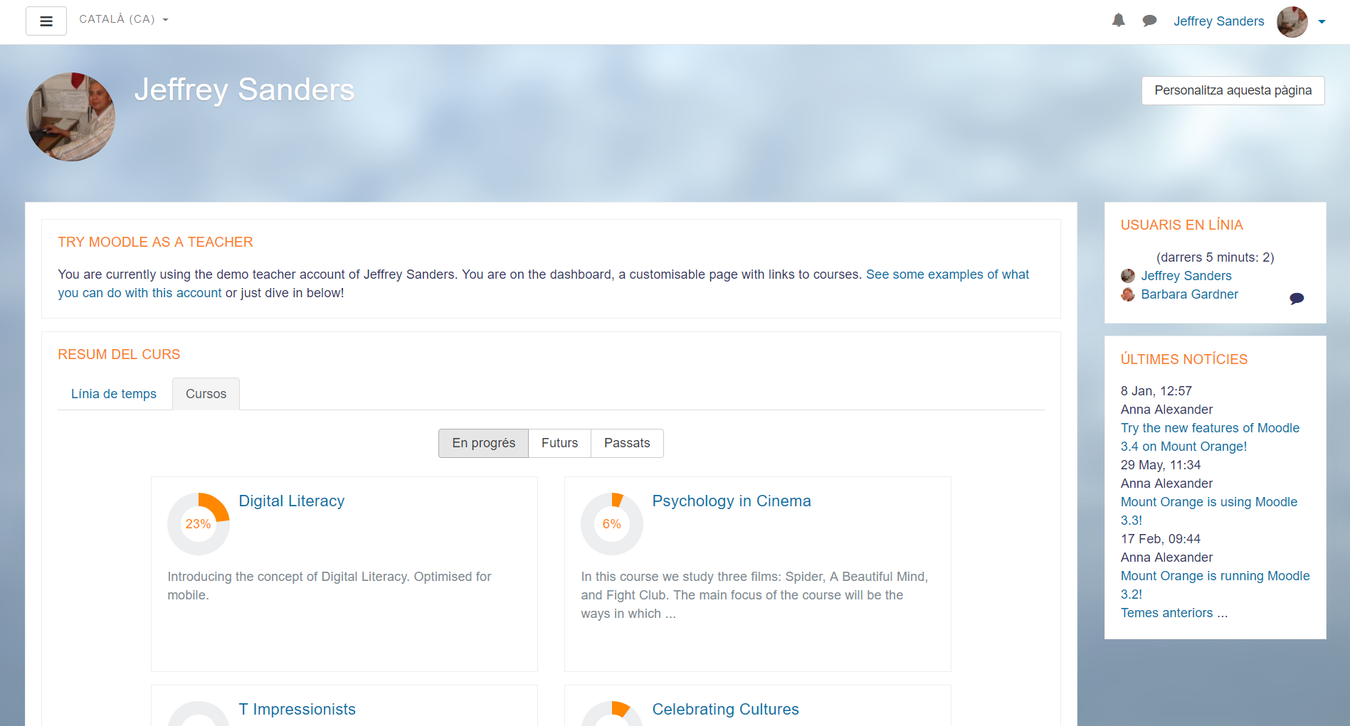 Captura de pantalla de la pàgina web de la demo de Moodle 3.5.